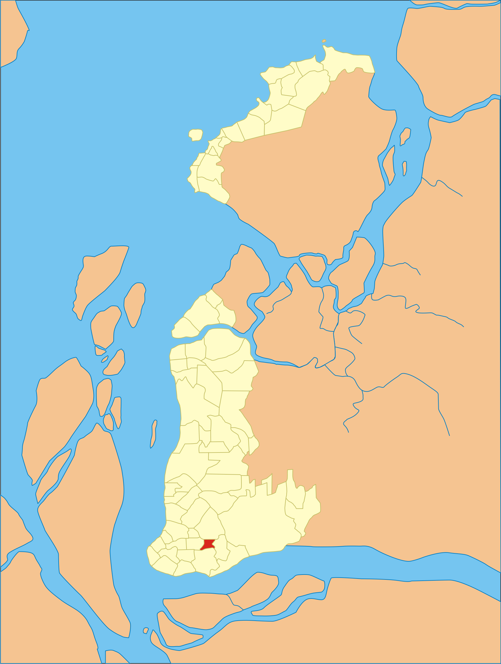 Localização do bairro em Belém do Pará.